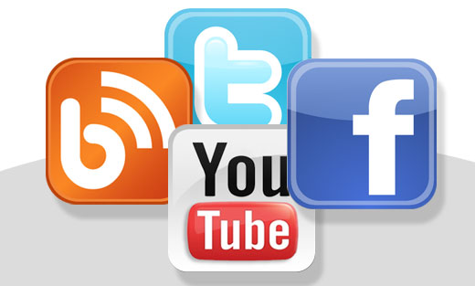 socmed